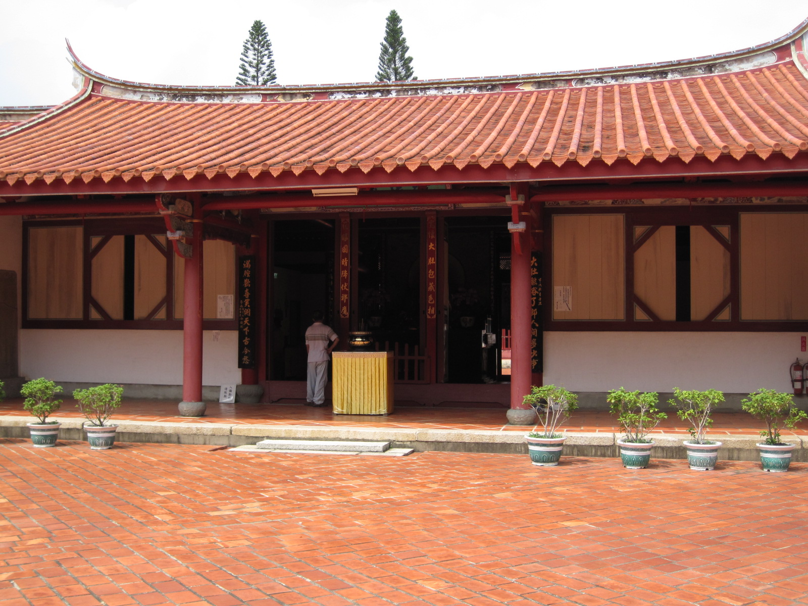 臺南開元寺彌勒殿